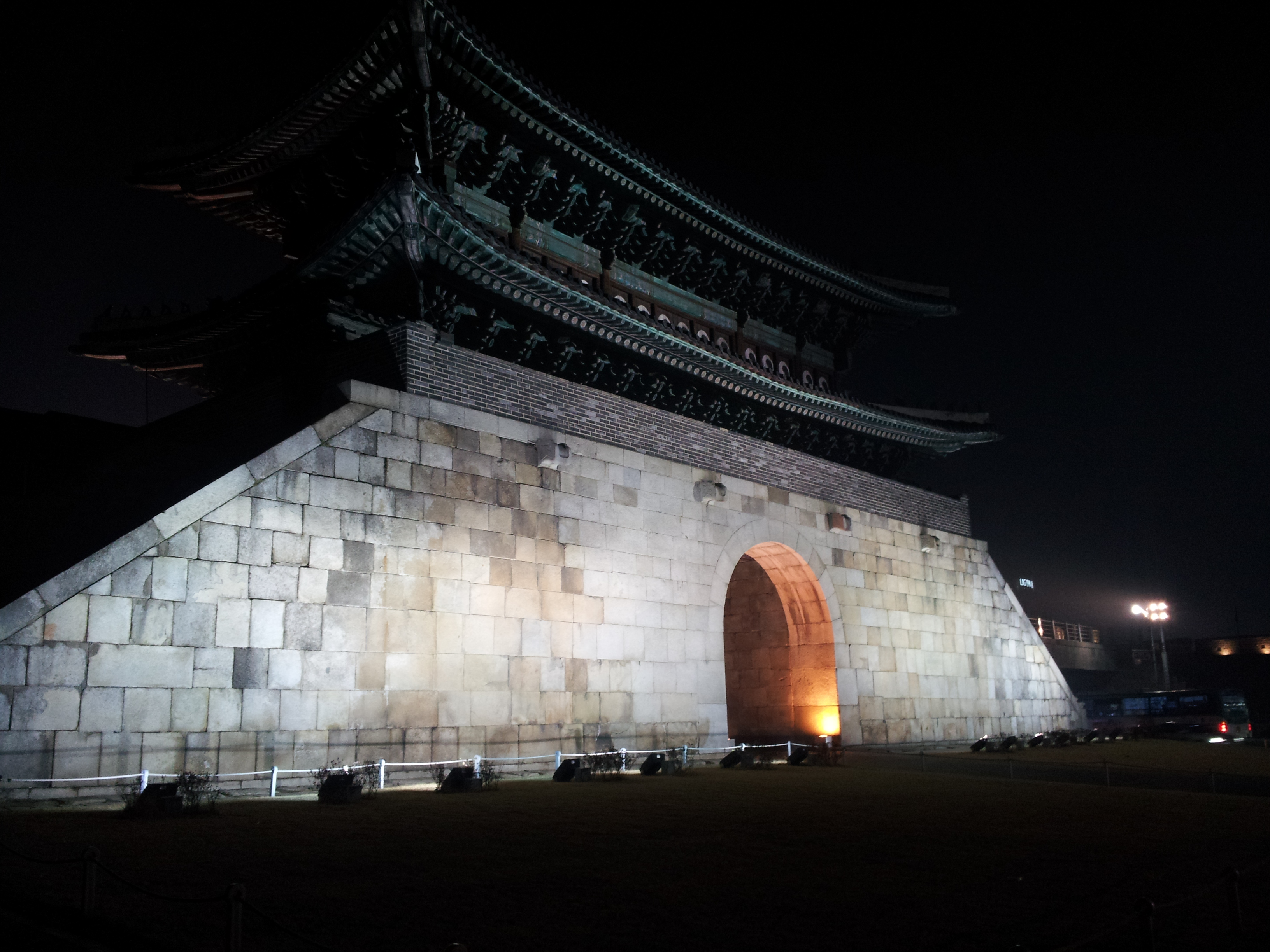 화성 장안문 후면